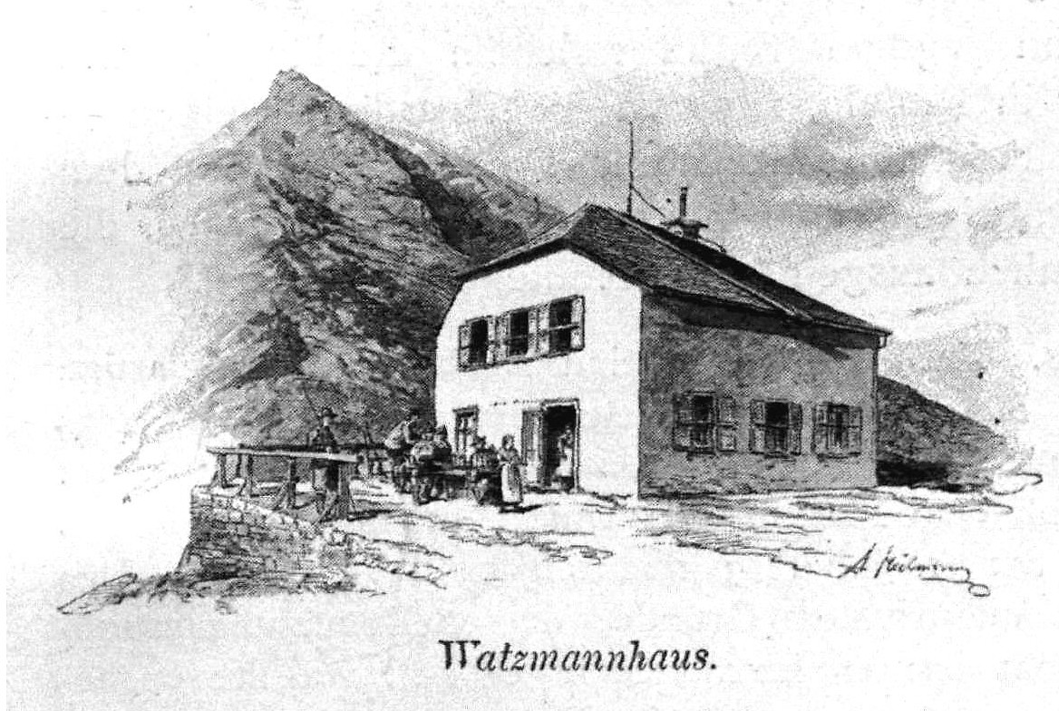 Watzmannhaus aus Zeitschrift des Deutschen und Oesterreichischen Alpenvereins 1894 Band 25